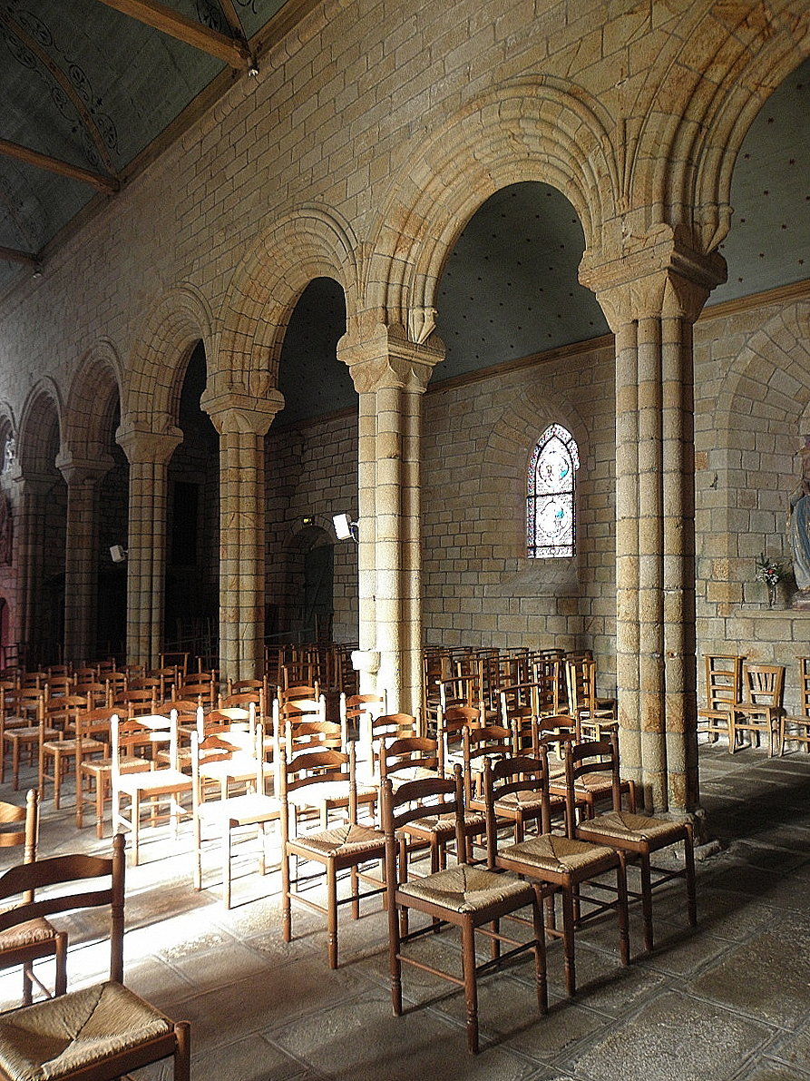 Nef et collatéral nord de la collégiale Notre-Dame-de-Roscudon à Pont-Croix (29). .